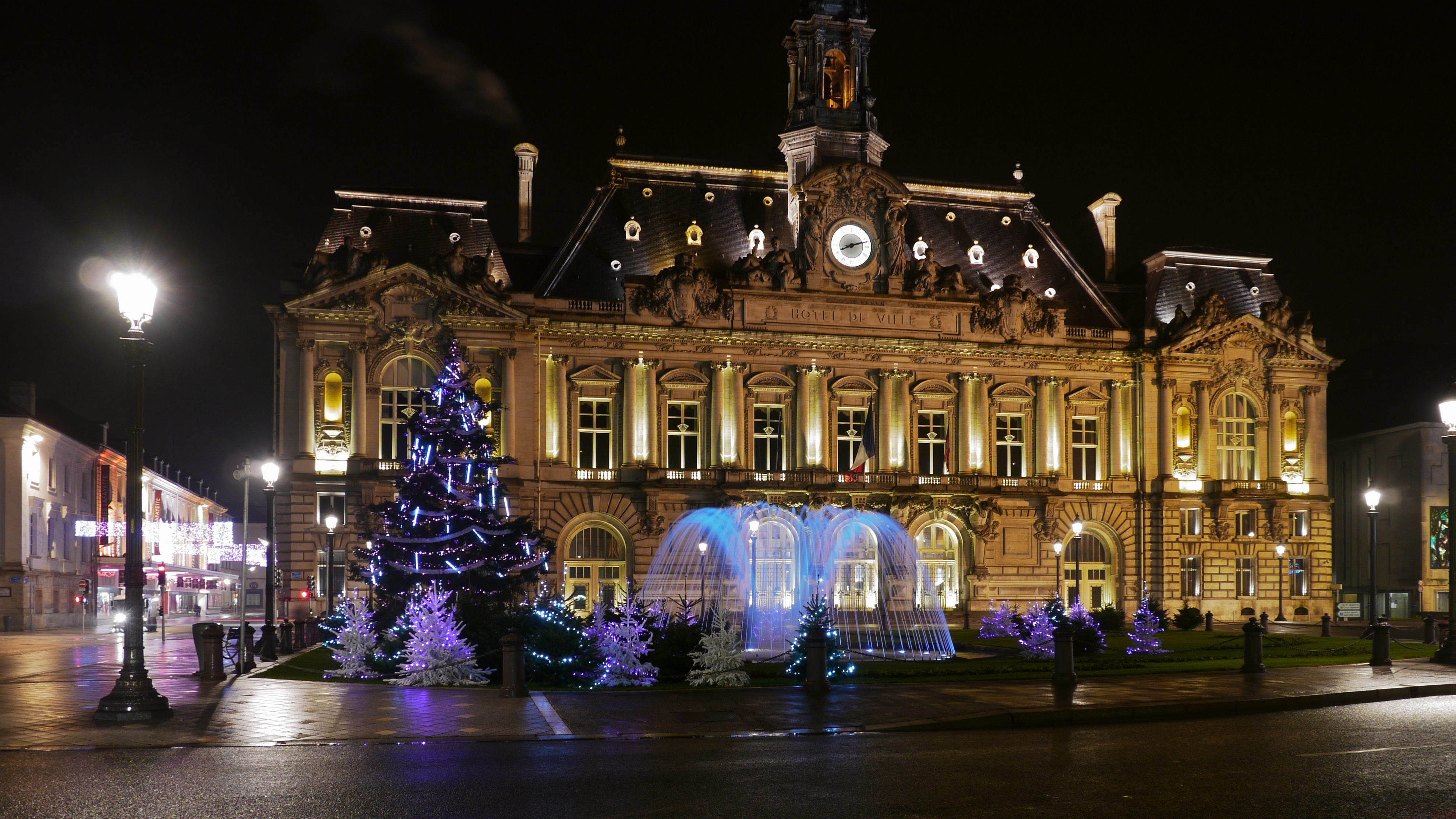 Tours, France